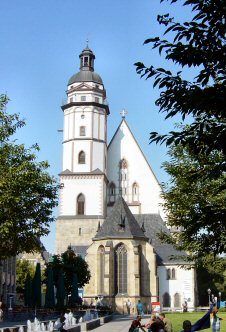 Leipziger Thomaskirche